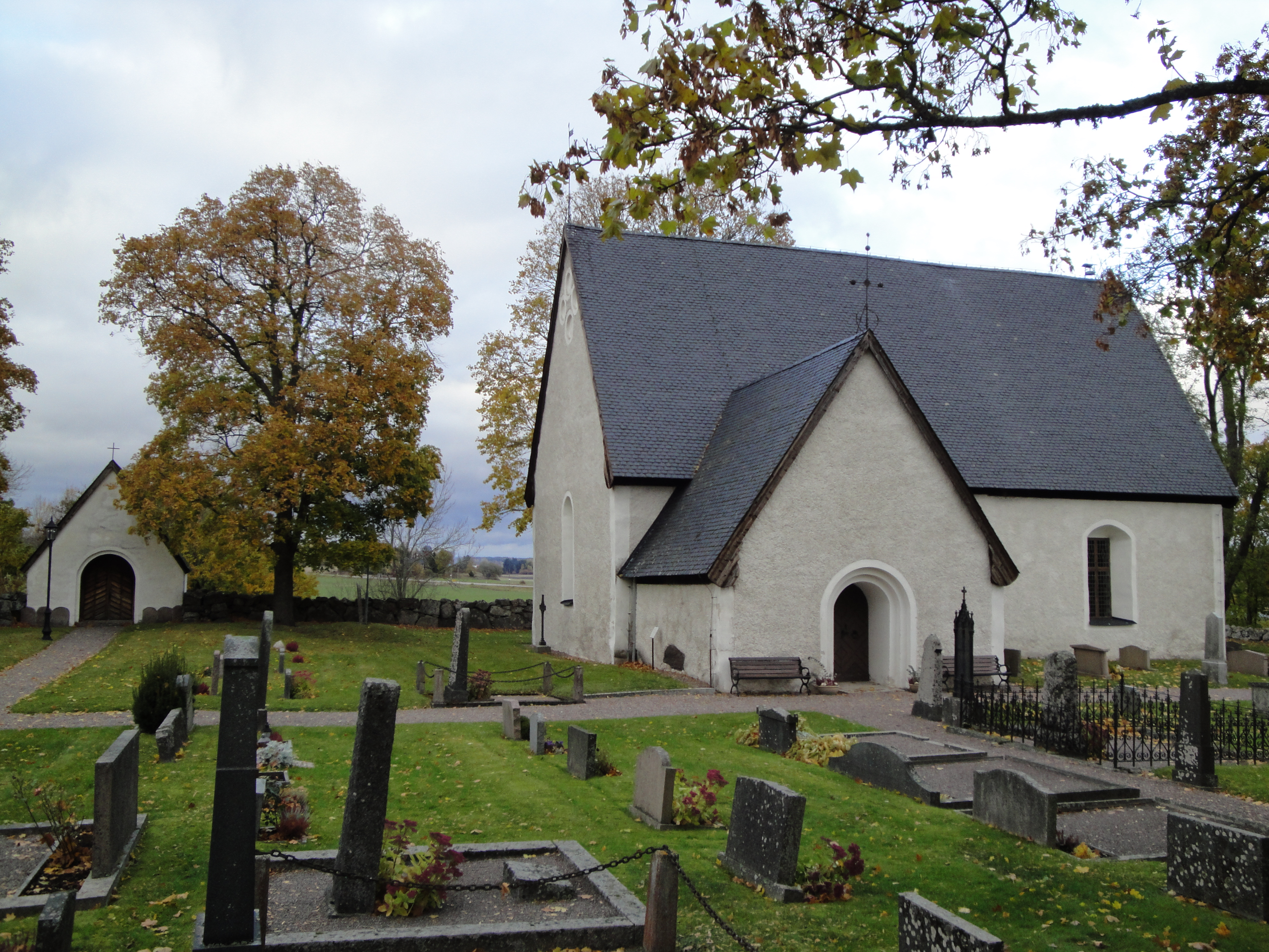 Lunda kyrka, Uppsala stift, Sigtuna kommun.